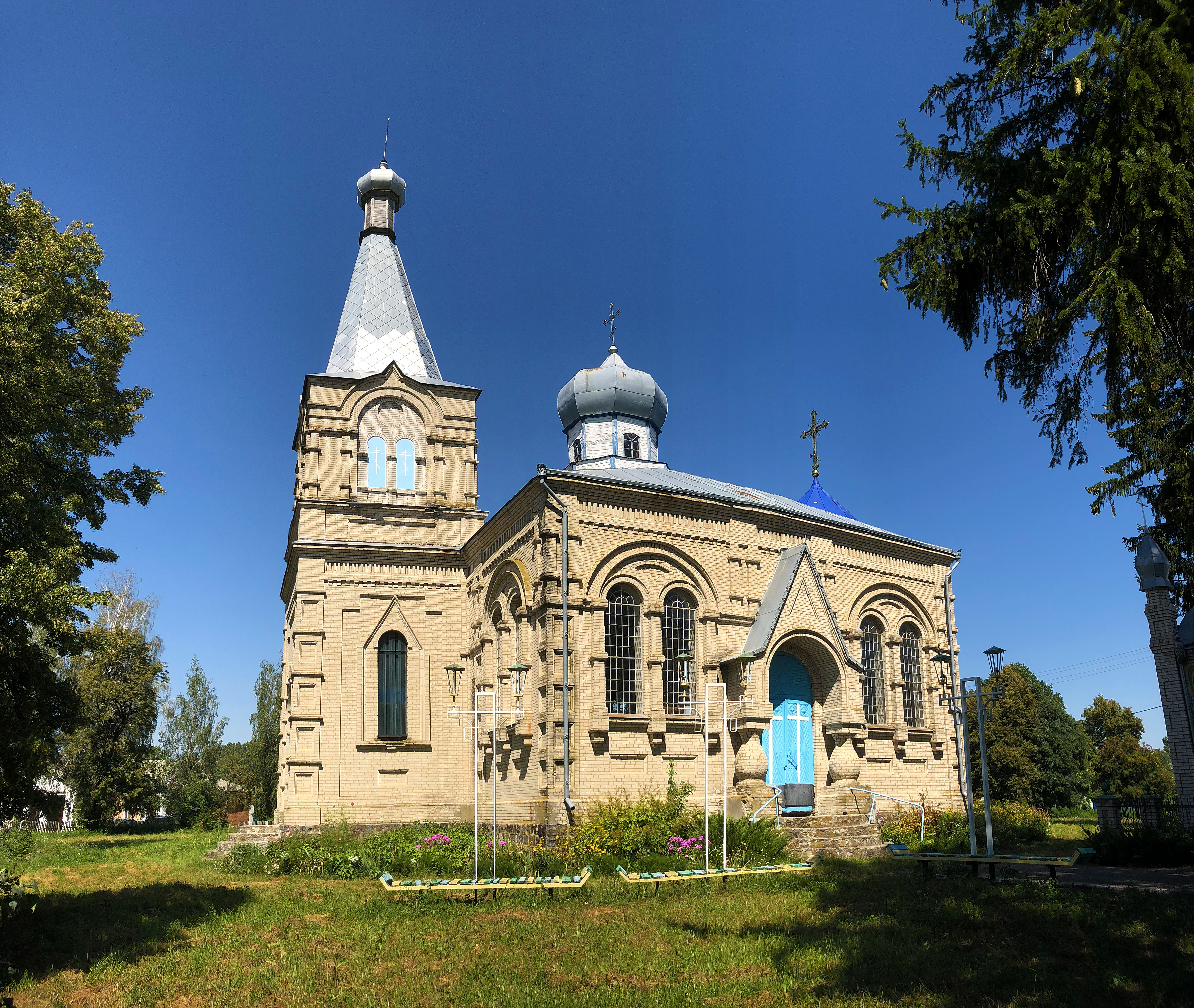 Церква Усікнення голови Іоанна Предтечі, Великі Крушлинці, вул. Українська, 34-А